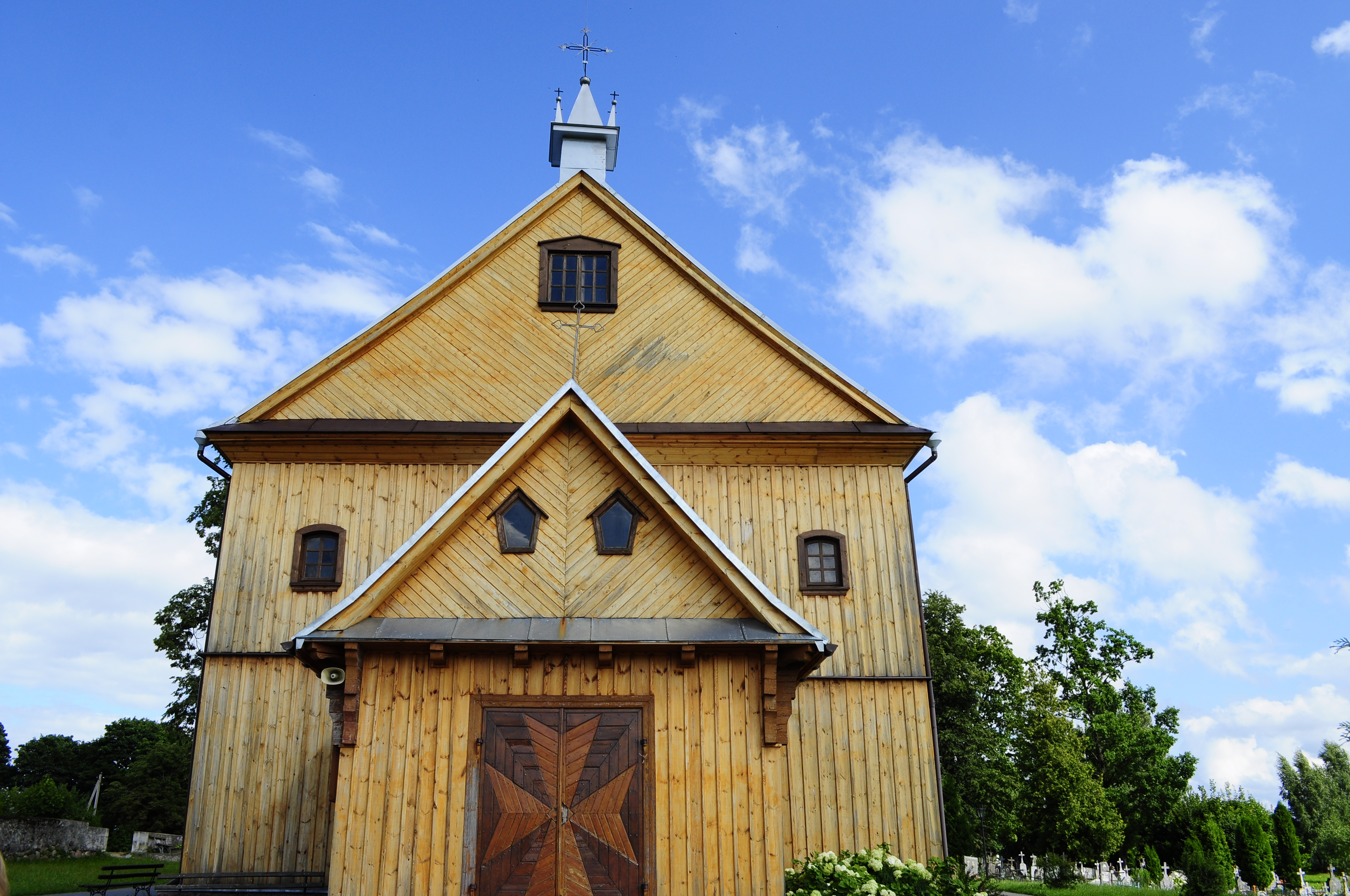 Беларуская (тарашкевіца): Гудагай. касьцёл Маці Божай Шпаклернай This is a photo of Belarusian heritage monument. Reference number: 412Г000042 ( WLM)